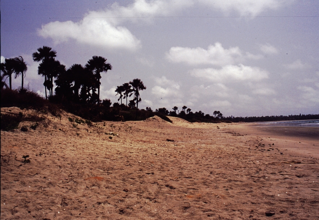 Strandabschnitt bei Gunjur, weit weg von den Touristenstränden